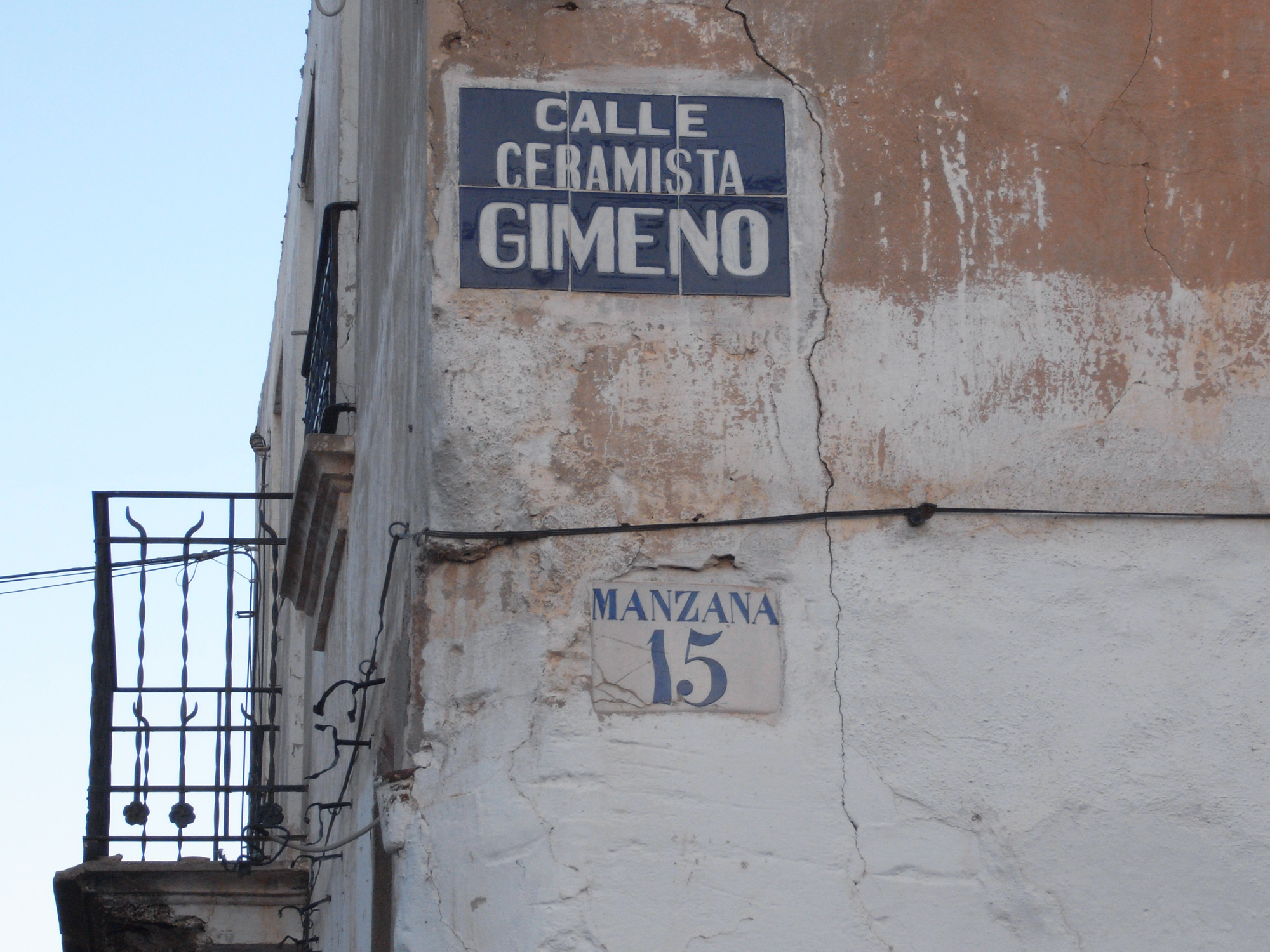 plaque de rue en carreau de faïence à Manises, Espagne